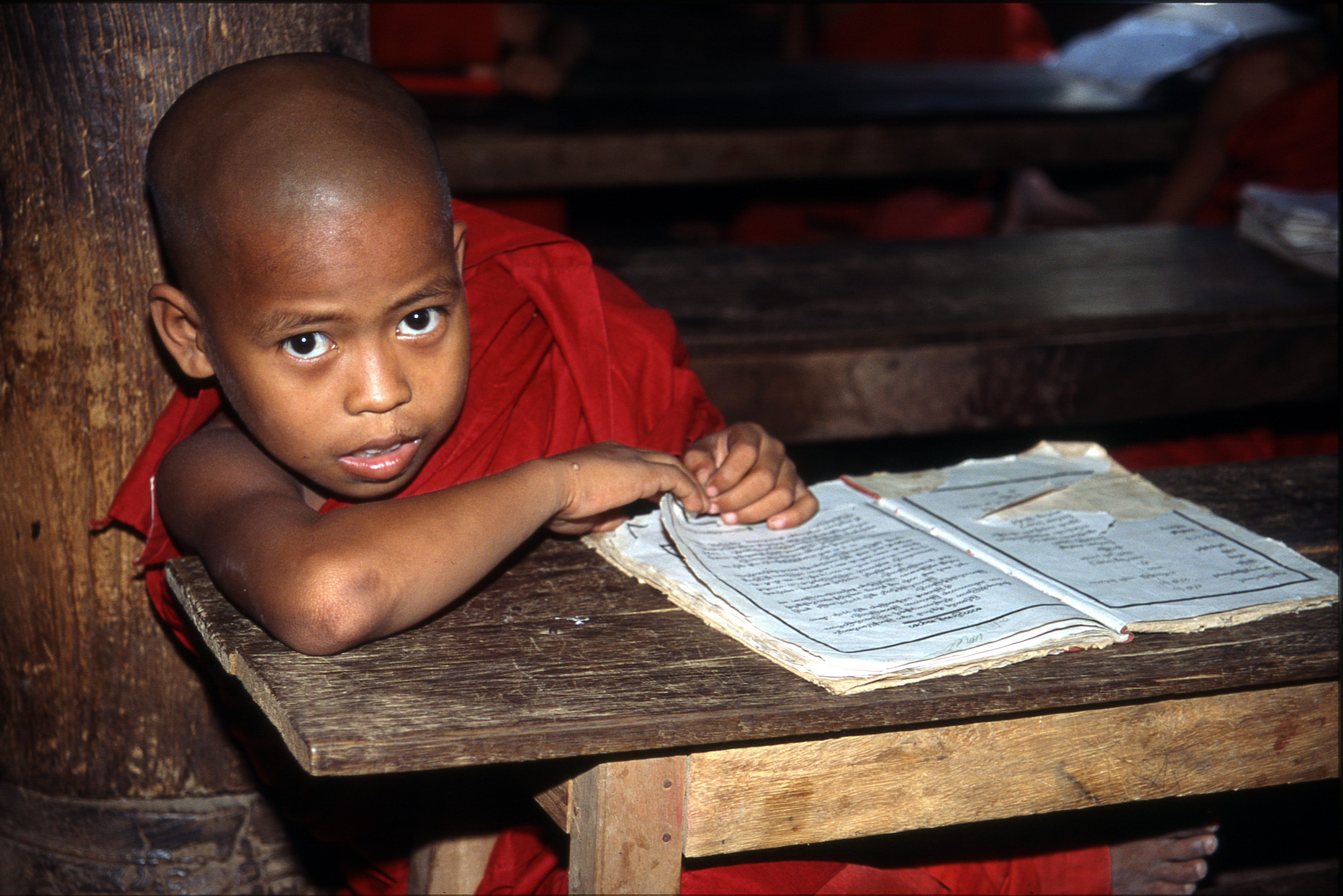 Birmanie, moinillon dans un monastère